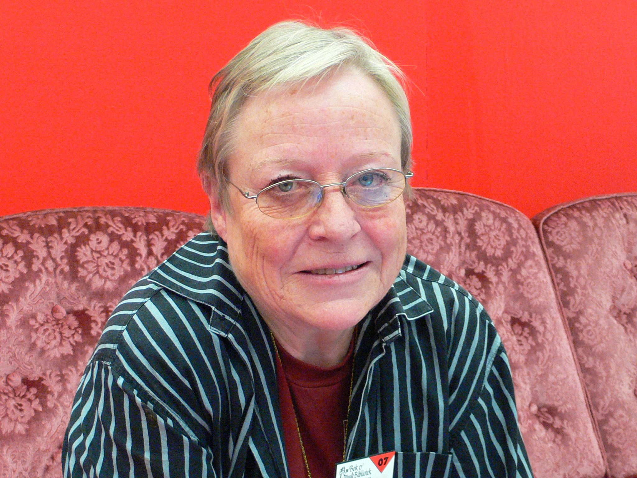 Yrsa Stenius at Gothenburg Book Fair 2007, Yrsa Stenius på Bok- och biblioteksmässan 2007